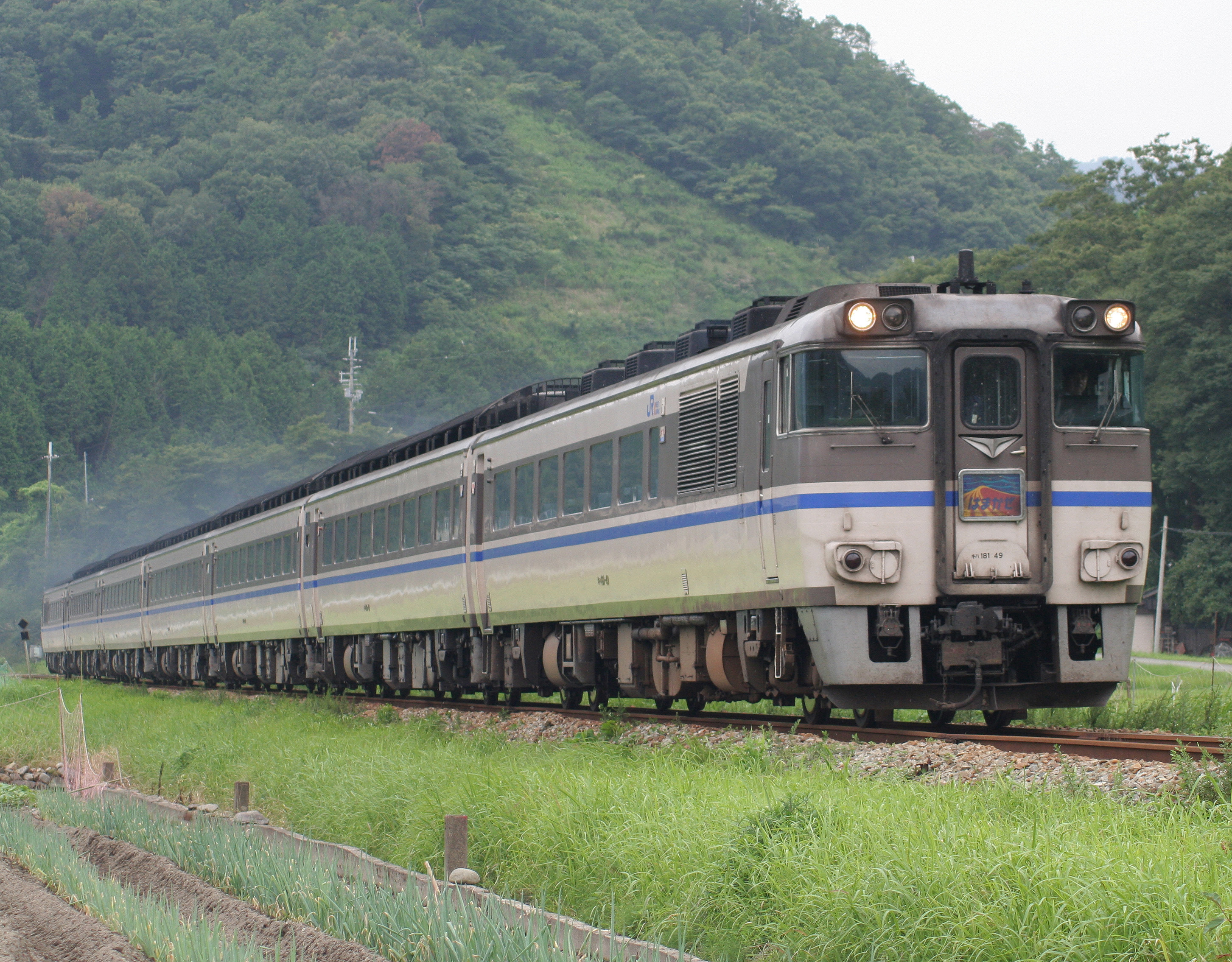 JR西日本キハ181系気動車 特急はまかぜ3号 播但線、竹田-和田山（私有地内から地主の許可を得て撮影）